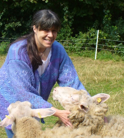 Schriftstellerin Susanne Ptak (* 1964) in ihrer Heimat Ostfriesland